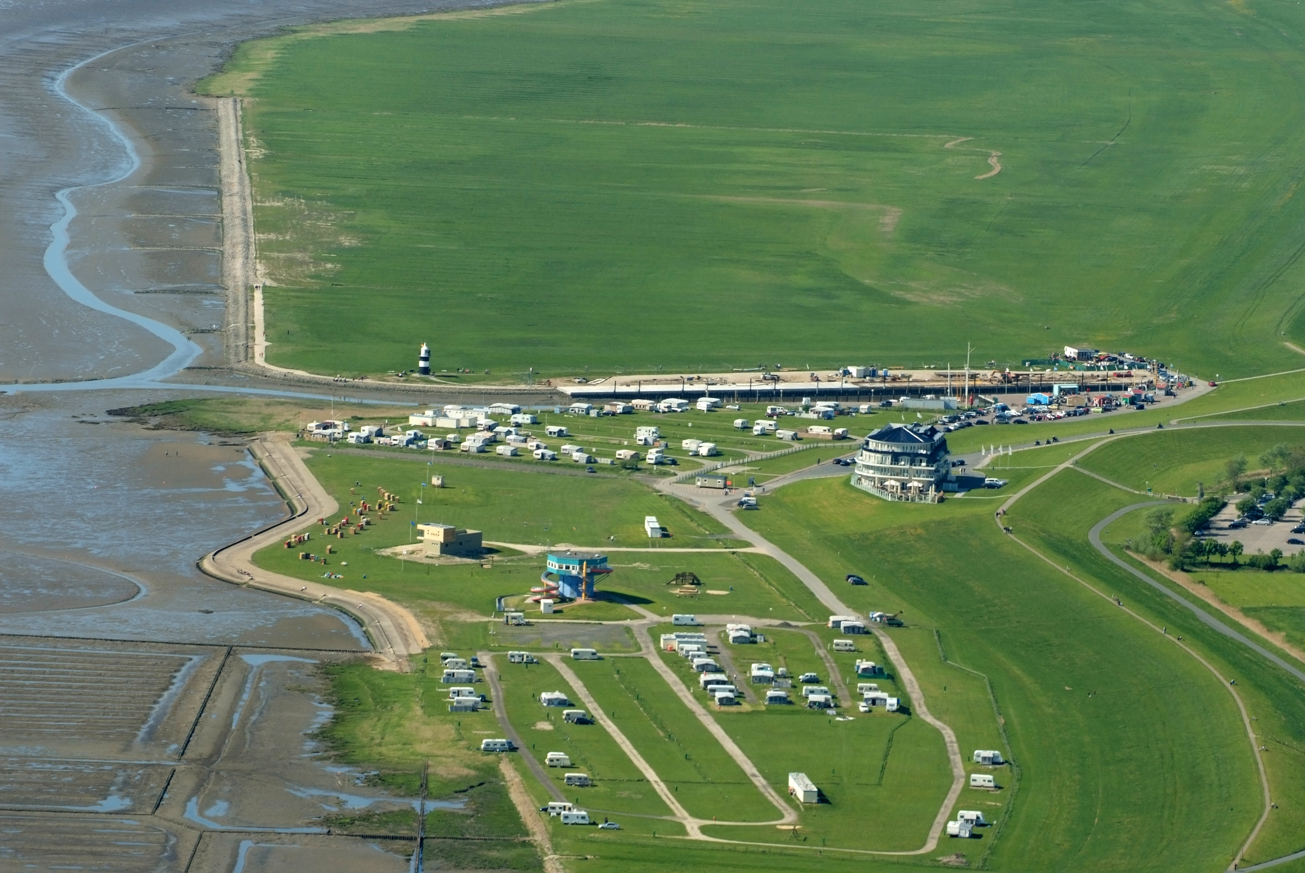 Nordseestrand und Deich bei Wremen mit Campingplatz, Wasserrutsche, Hotel Deichgraf und Leuchtturm "Kleiner Preuße" Fotoflug vom Flugplatz Nordholz-Spieka über Bremerhaven, Wilhelmshaven und die Ostfriesischen Inseln bis Borkum